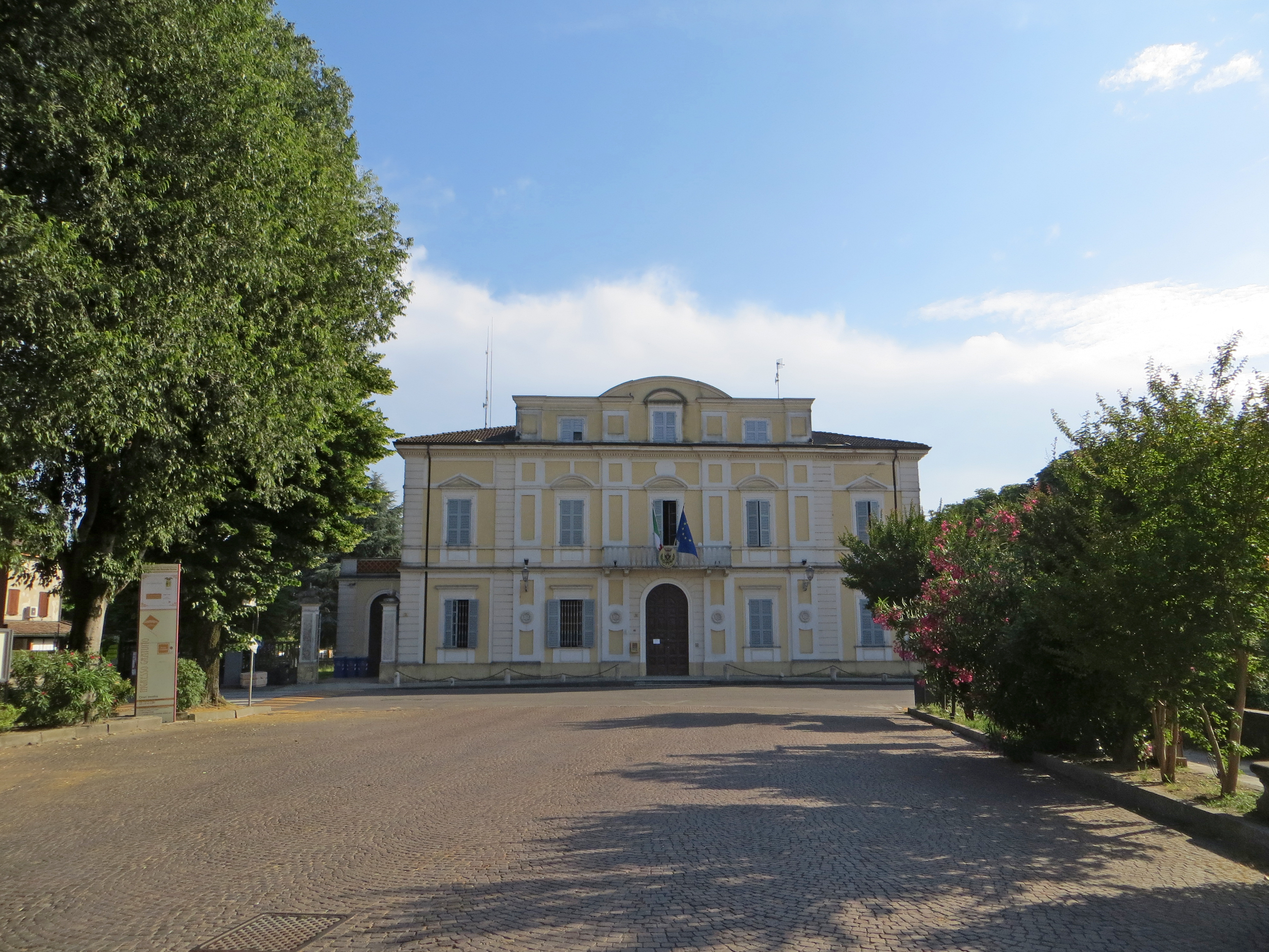 Palazzo comunale (Zibello) - facciata